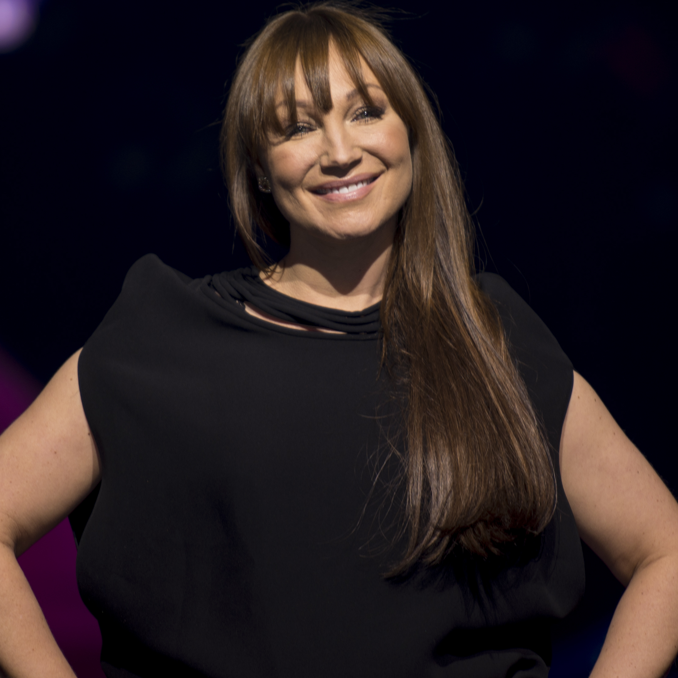 Charlotte Perrelli på en presskonferens under första deltävlingen av Melodifestivalen 2017 i Göteborg.